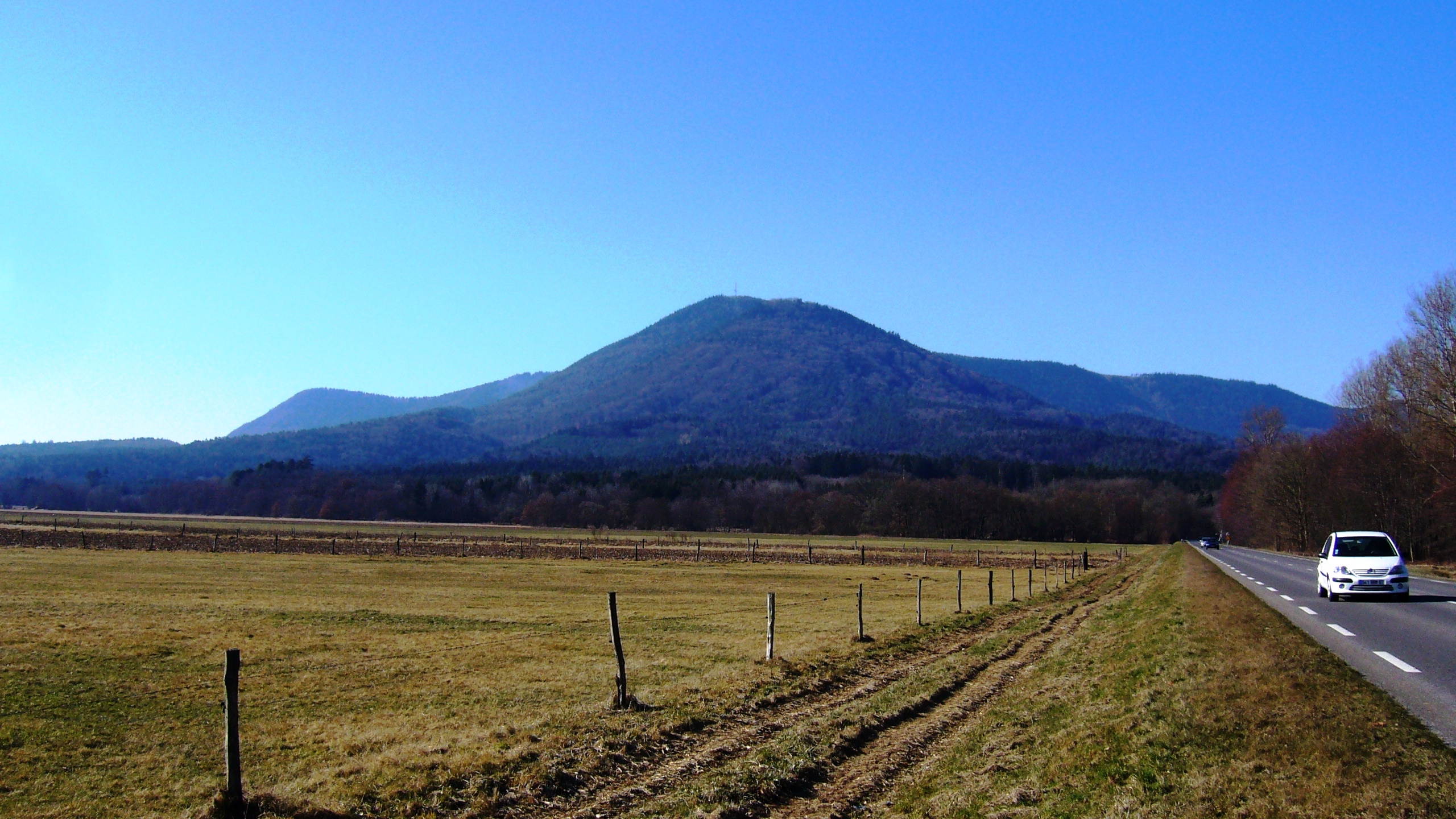 Rocher du Coucou 002.JPG